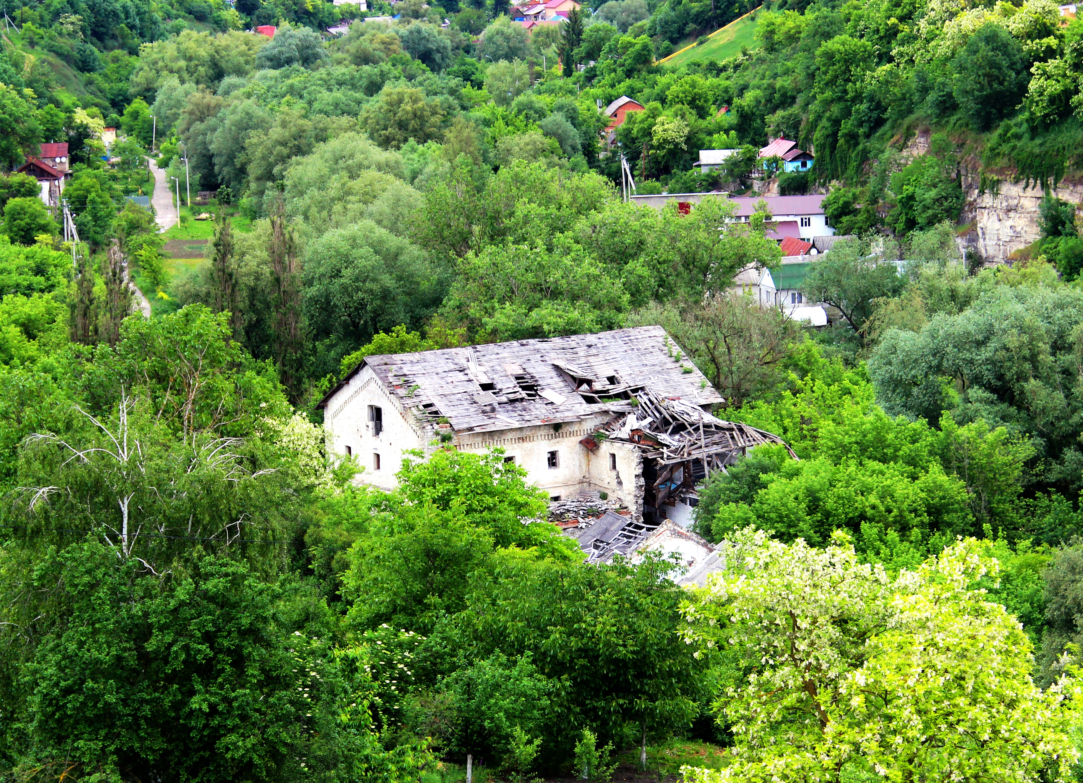 Млин Ірафа, Кам'янець-Подільський, Видровецький узвіз, 24 Ще два роки тому будівля була цілою